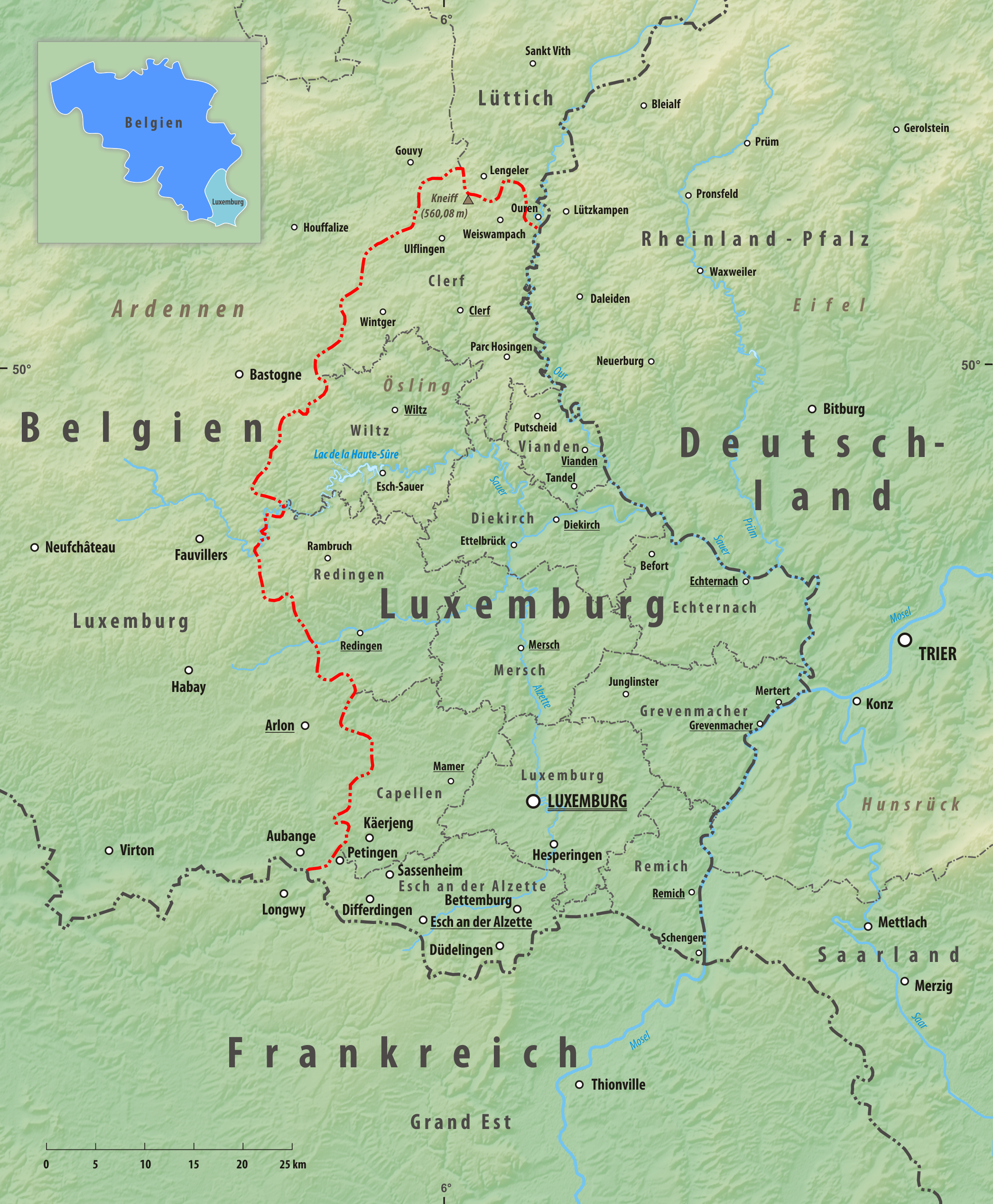 Reliefkarte des Grenzverlaufes zwischen Belgien und Luxemburg Topographischer Hintergrund: NASA Shuttle Radar Topography Mission (public domain). SRTM3 v.2.